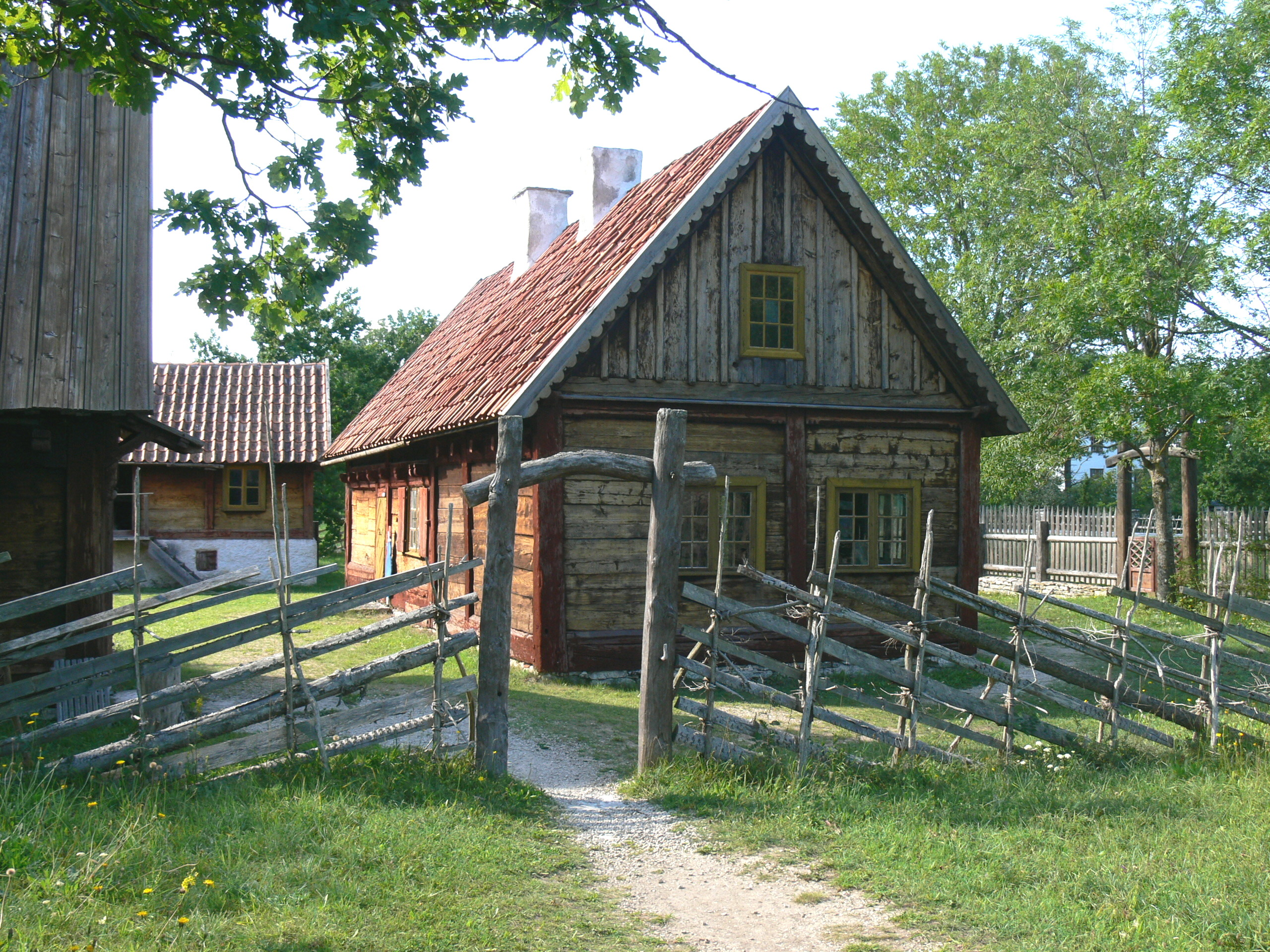 Bunge Museum auf Gotland. Hof ( 18.Jhdt. ): Außenansicht